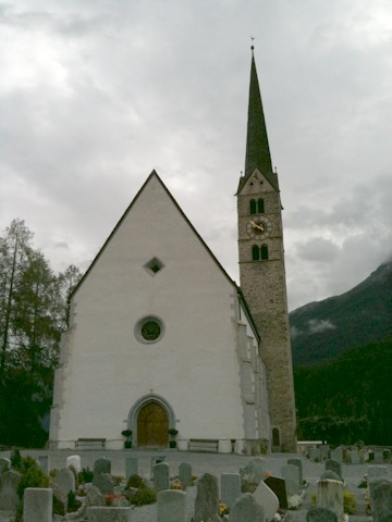 reformierte Kirche Scuol mit Friedhof